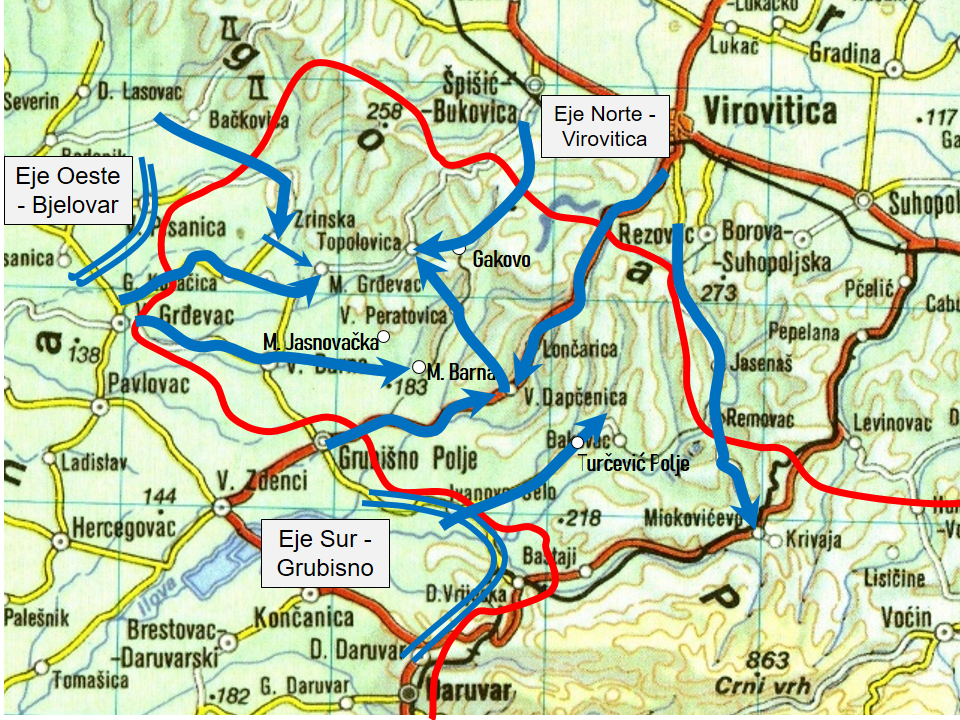 Confeccionado sobre la base de Crkvenac, Đuro; Kovačević, Franjo (2014). «Vojna operacija Otkos - 10: Planiranje, izvođenje i rezultati». Radovi Zavoda za znanstvenoistraživački i umjetnički rad u Bjelovaru (en croata) (8): 471-488. ISSN 1846-9787. Consultado el 2019-03-17.